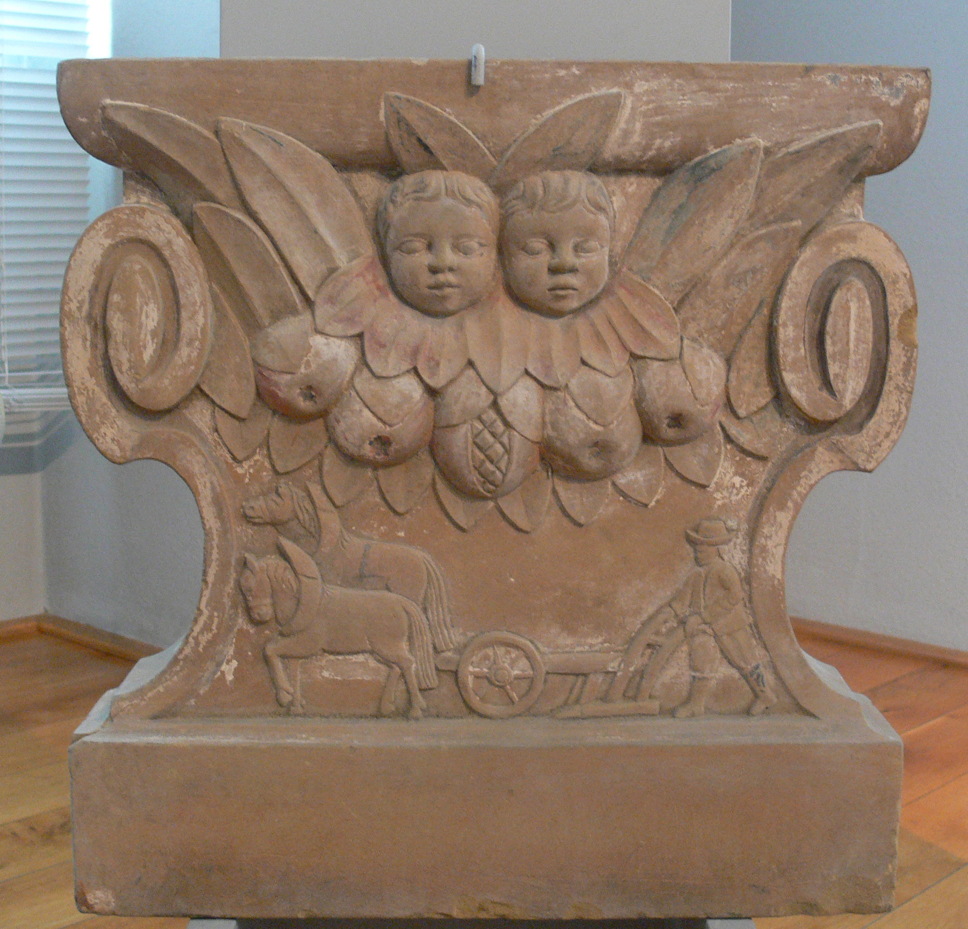 Ofenstein aus dem Haus eines Bauern (pflügender Bauer und Putti), behauener Sandstein, Württemberg, 2. Hälfte 18. Jh. Landesmuseum Württemberg (Außenstelle Museum für Volkskultur in Württemberg, Waldenbuch), 1.7., Inv. Nr. VK 1988/543